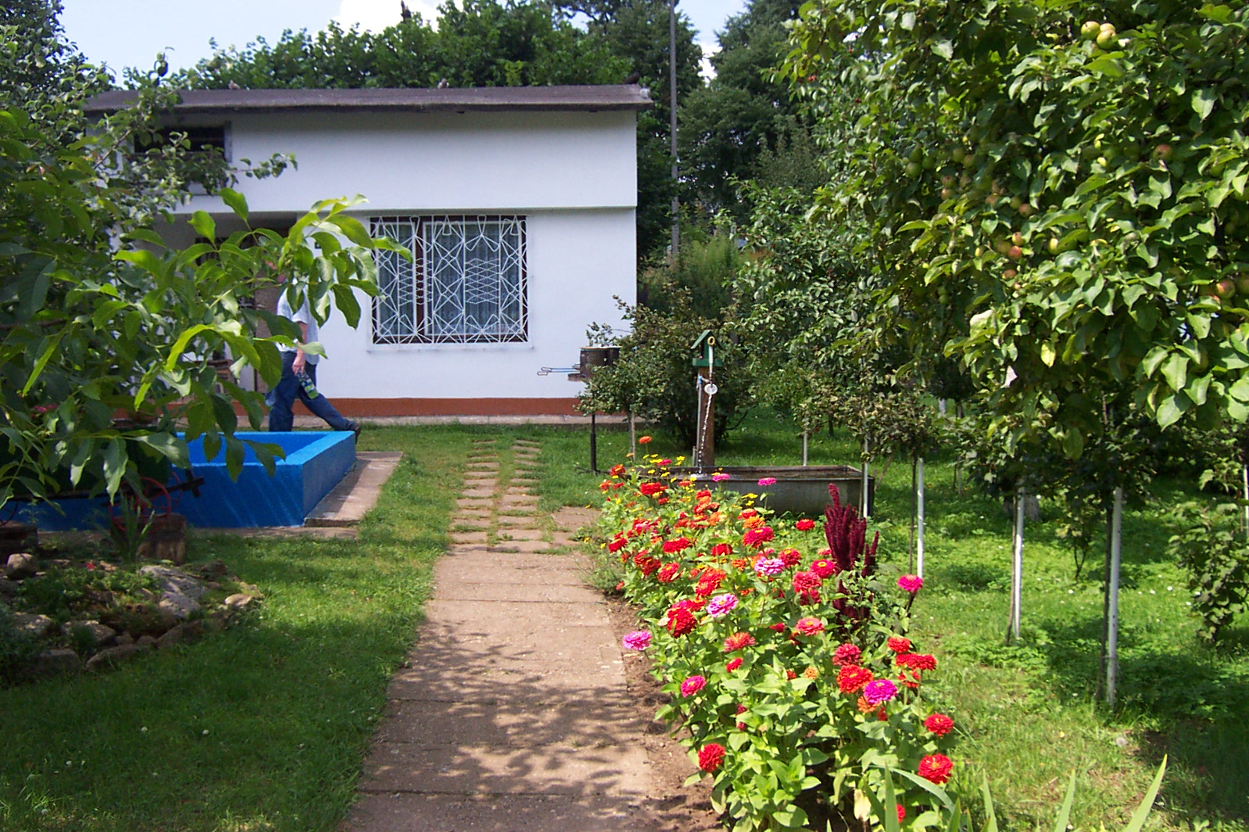 Gardens